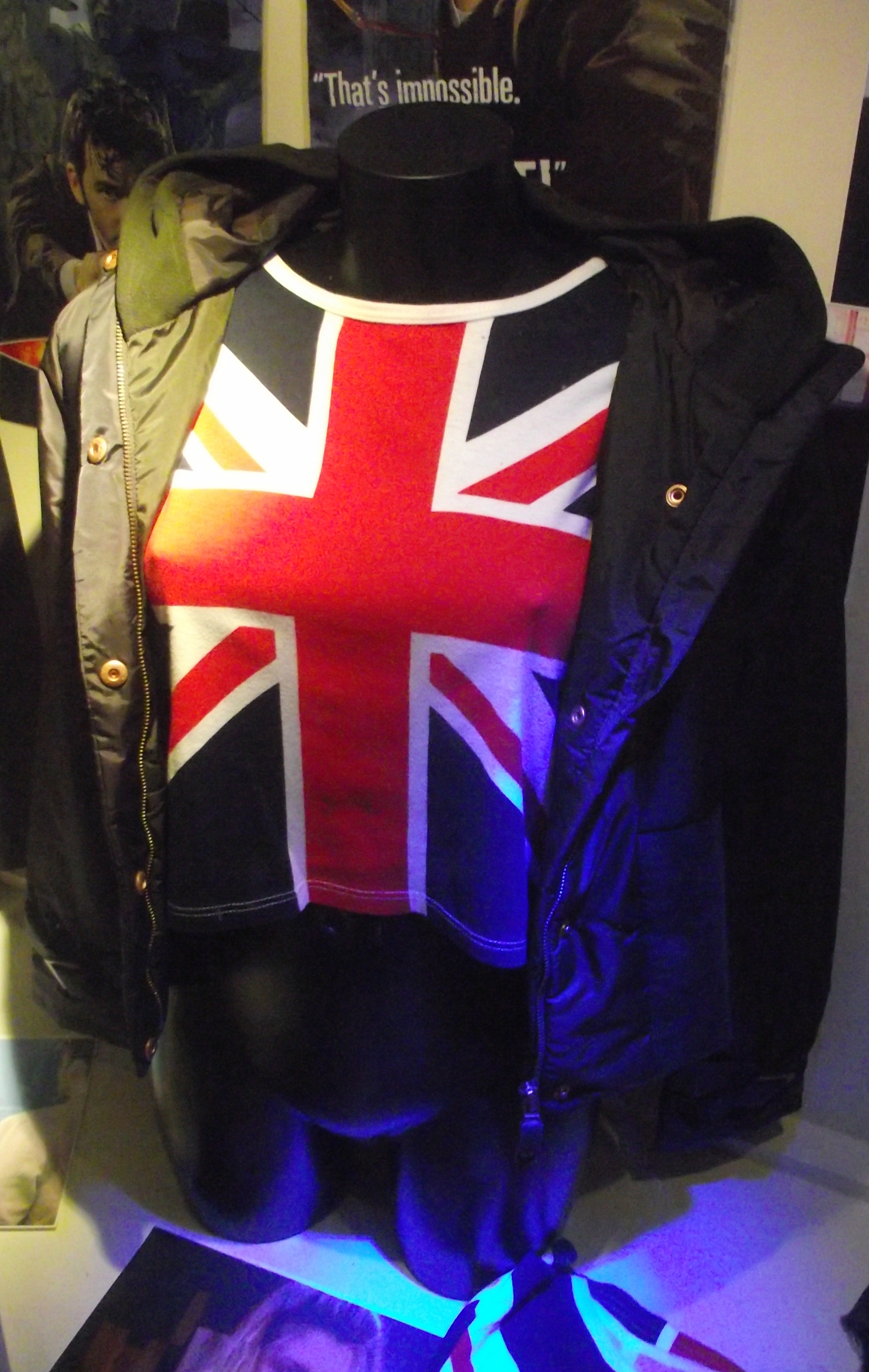 Rose Costume Time Machine Museum